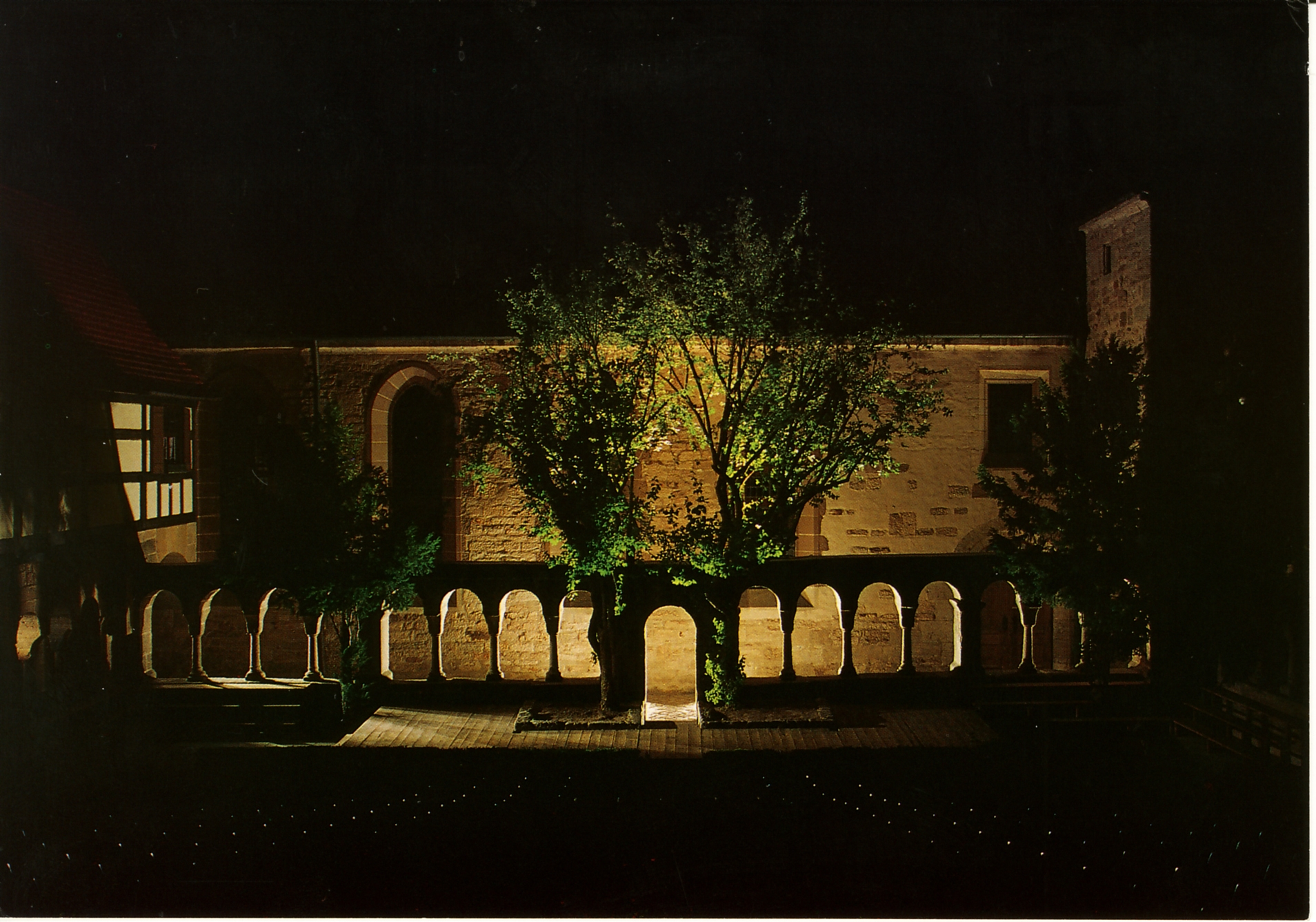 Kreuzgangbühne bei Nacht